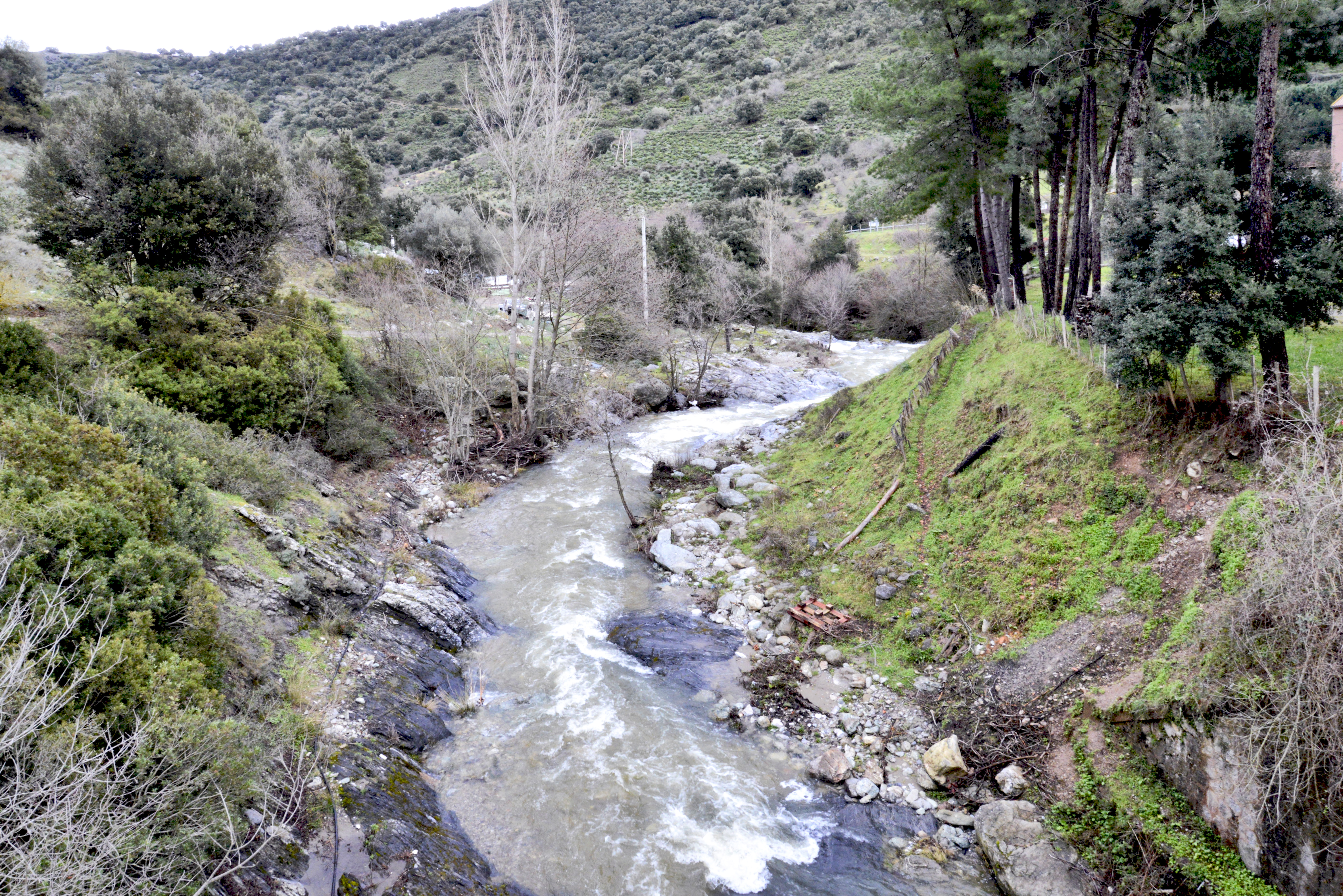 Omessa, Talcini (Haute-Corse) - Le ruisseau de Sumano (affluent du Golo) en aval du pont de Caporalino, peu avant le défilé sous le Monte a Supietra.